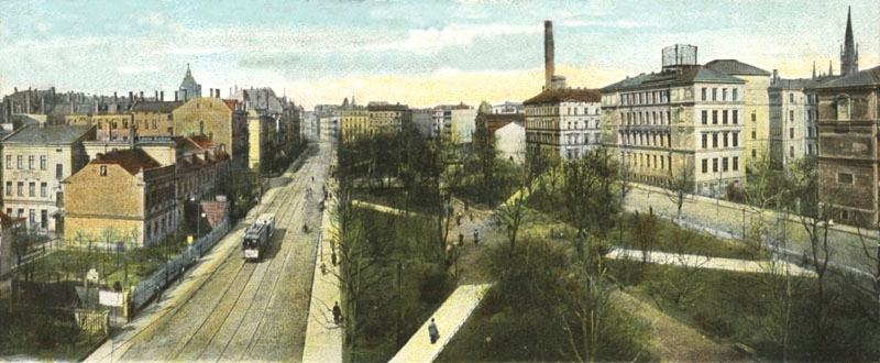 Floßplatz Leipzig um 1900; Schmuckplatz nach der Umgestaltung durch Stadtgartendirektor Otto Wittenberg; an der Westseite Leipziger Straßenbahnlinie über den Floßplatz